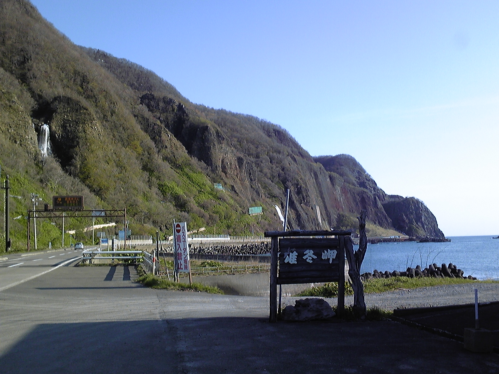 北海道石狩市雄冬岬